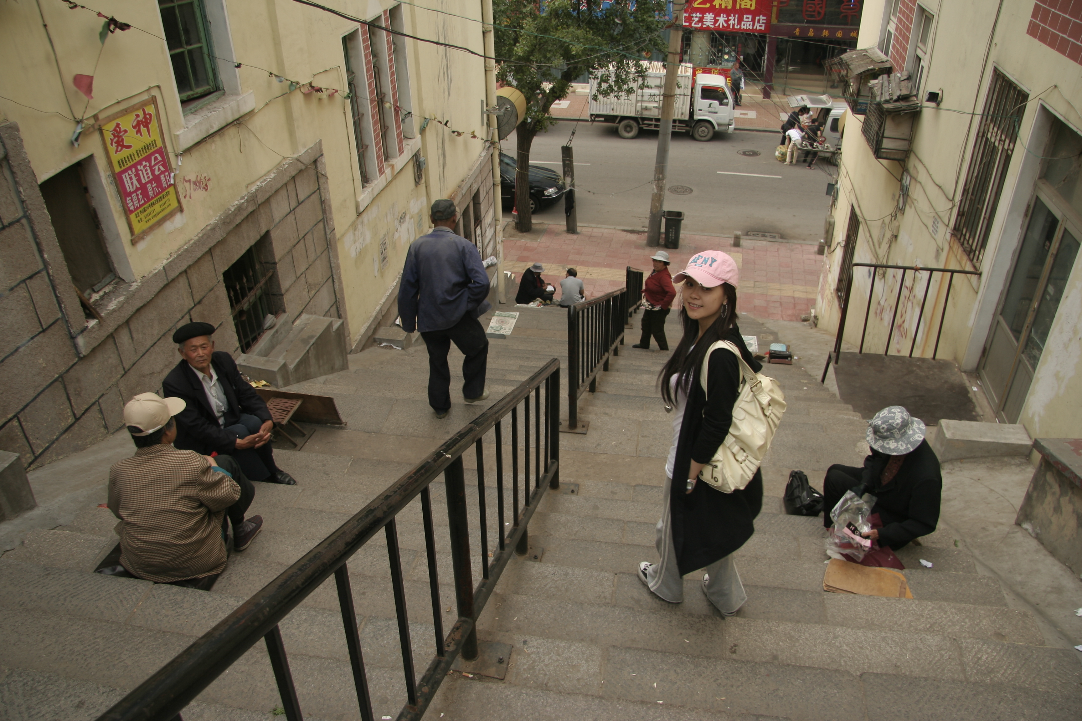 通往市场三路的石阶梯